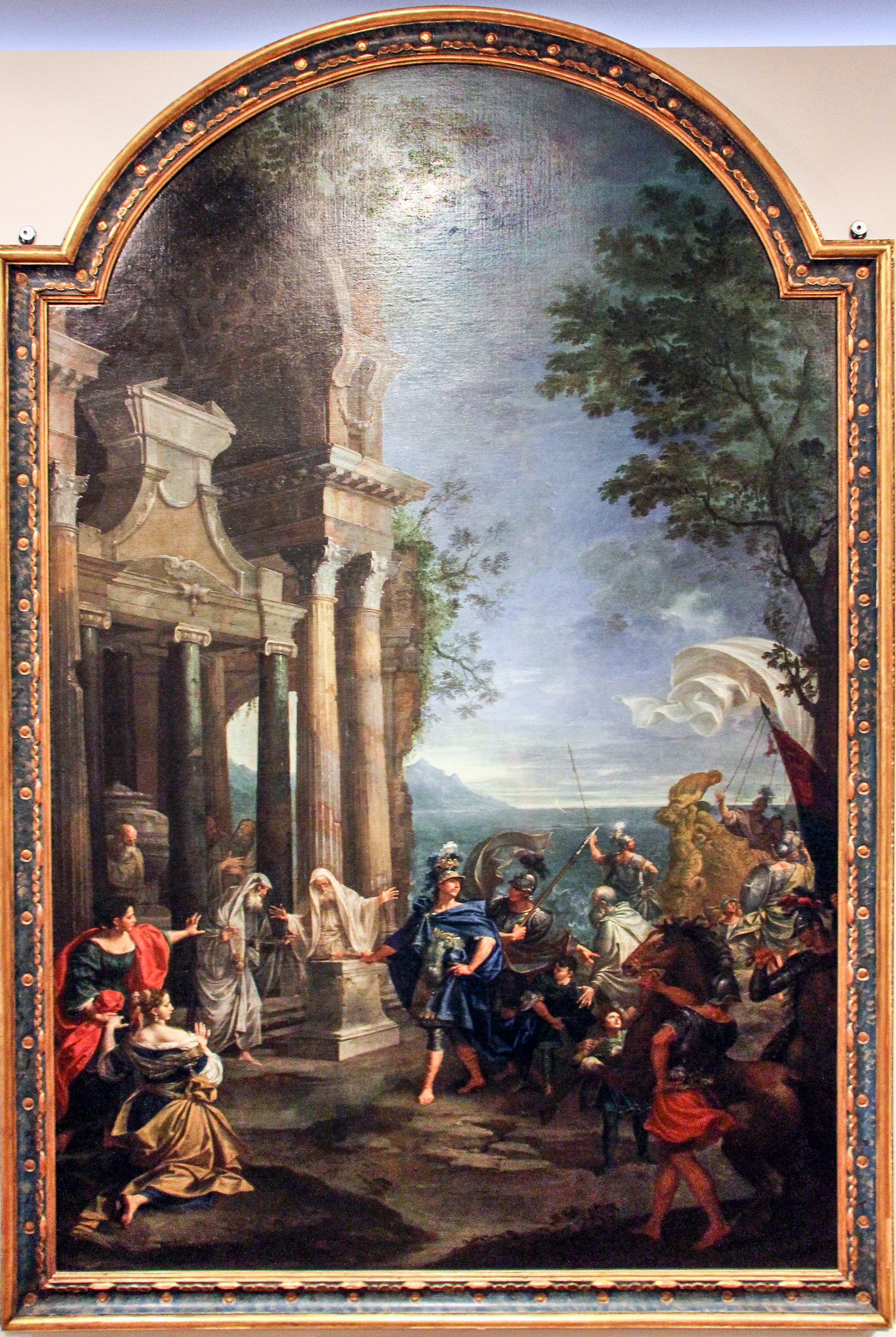 Fondazione Carisbo